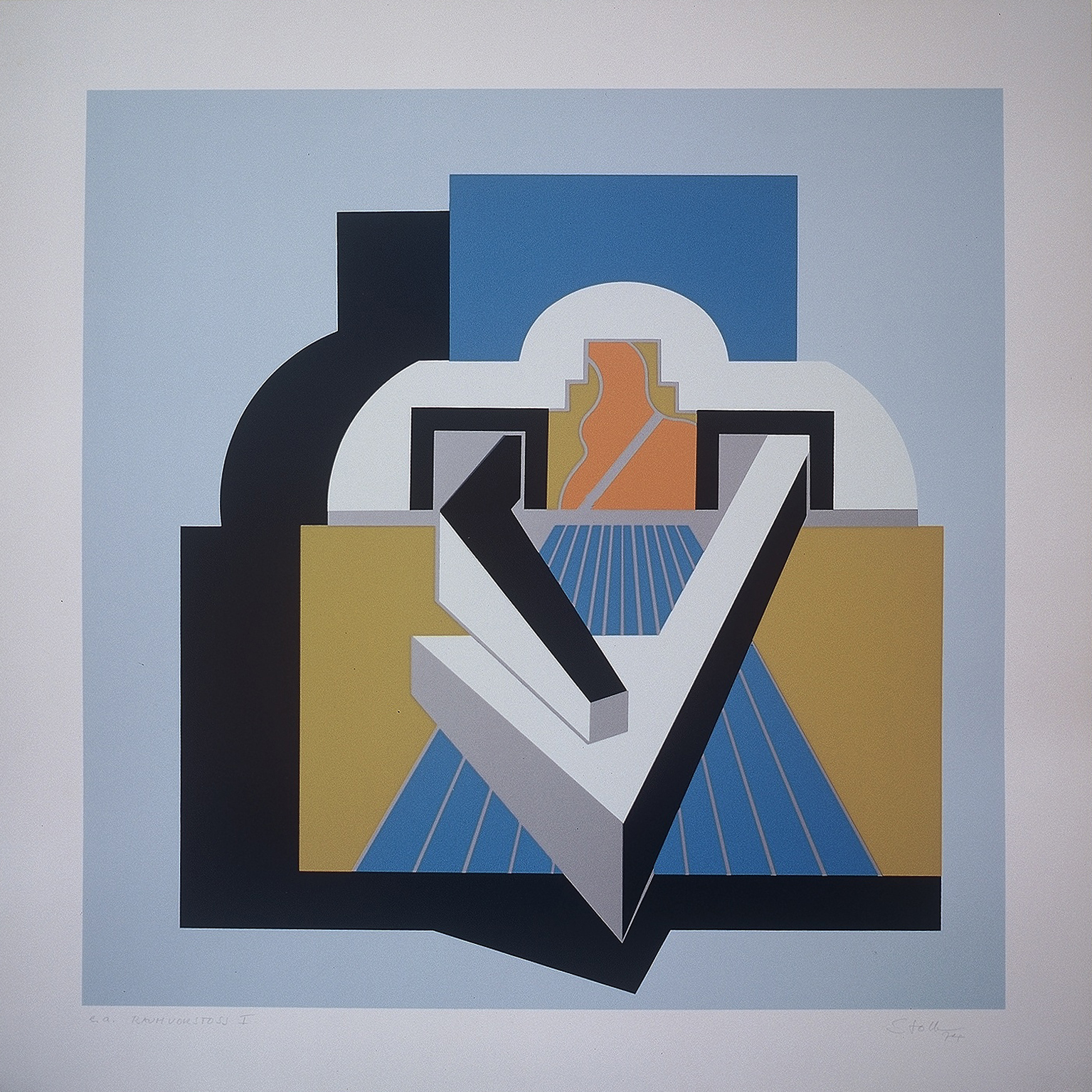 Raumvorstoß I von Ursula Stock, 50 x 50 cm, 1972.